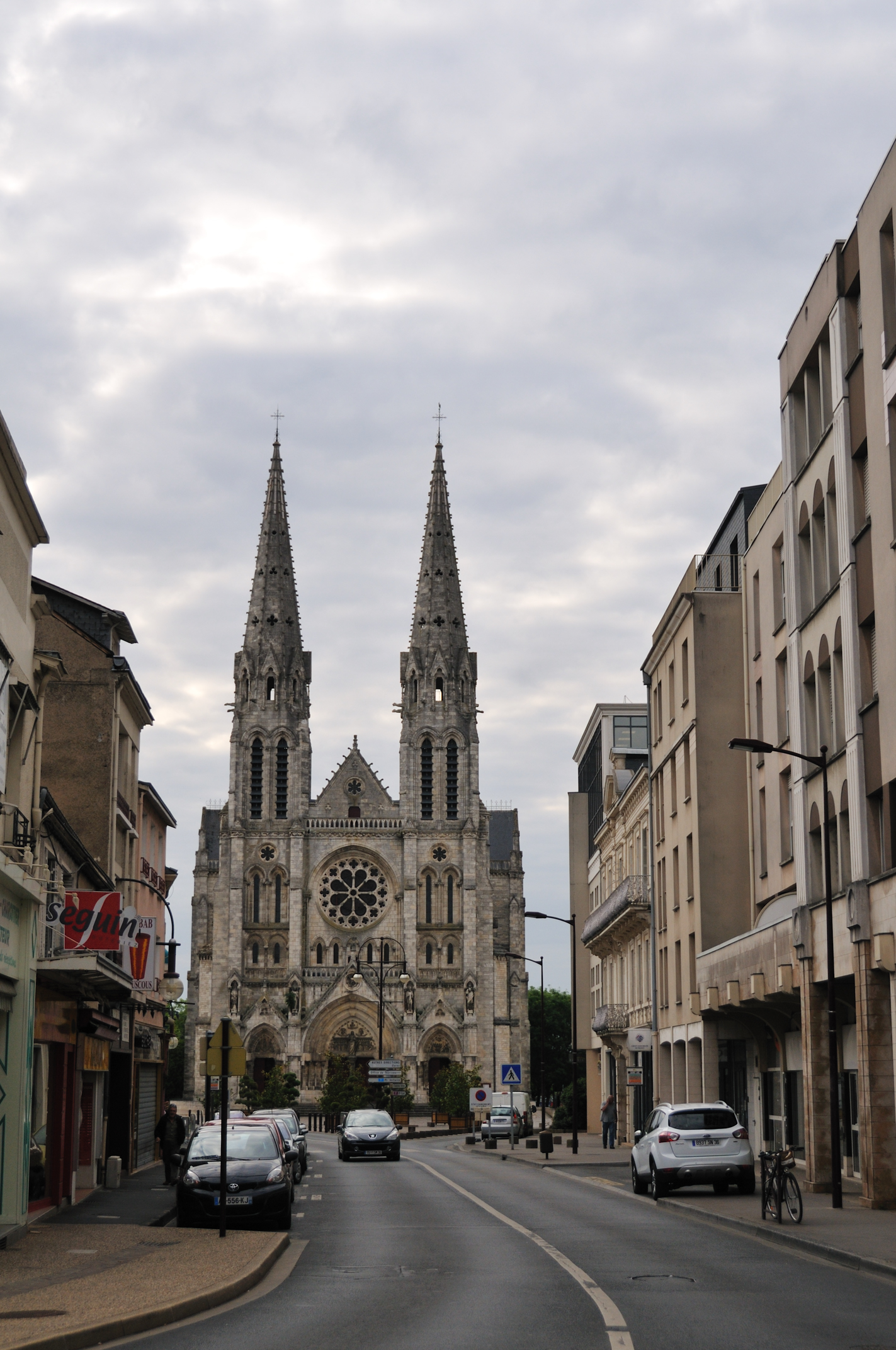 Église Saint-André, Châteauroux, Indre, France